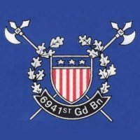 Insignia, 6941st Guard Battalion